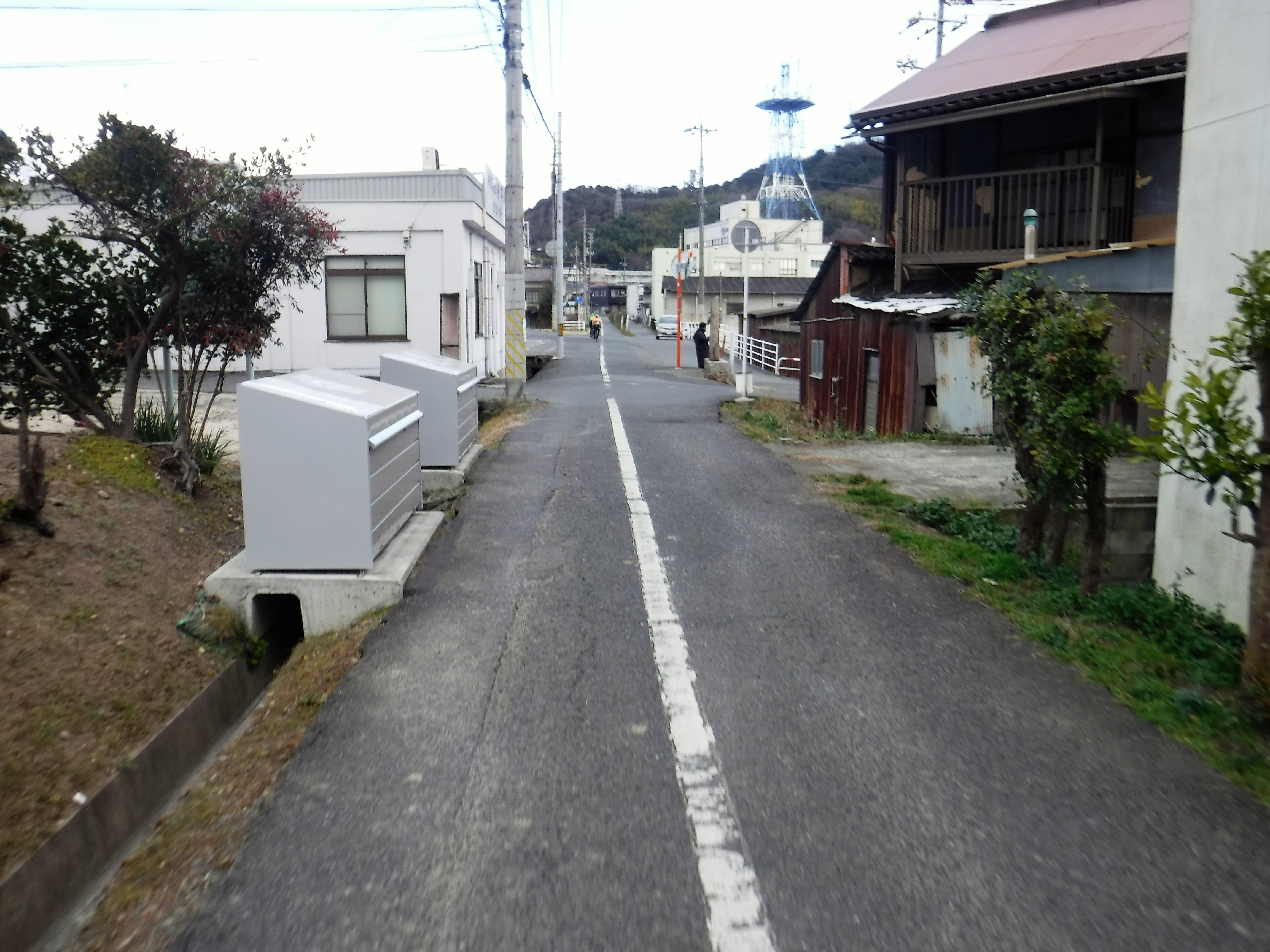 井笠鉄道跡地